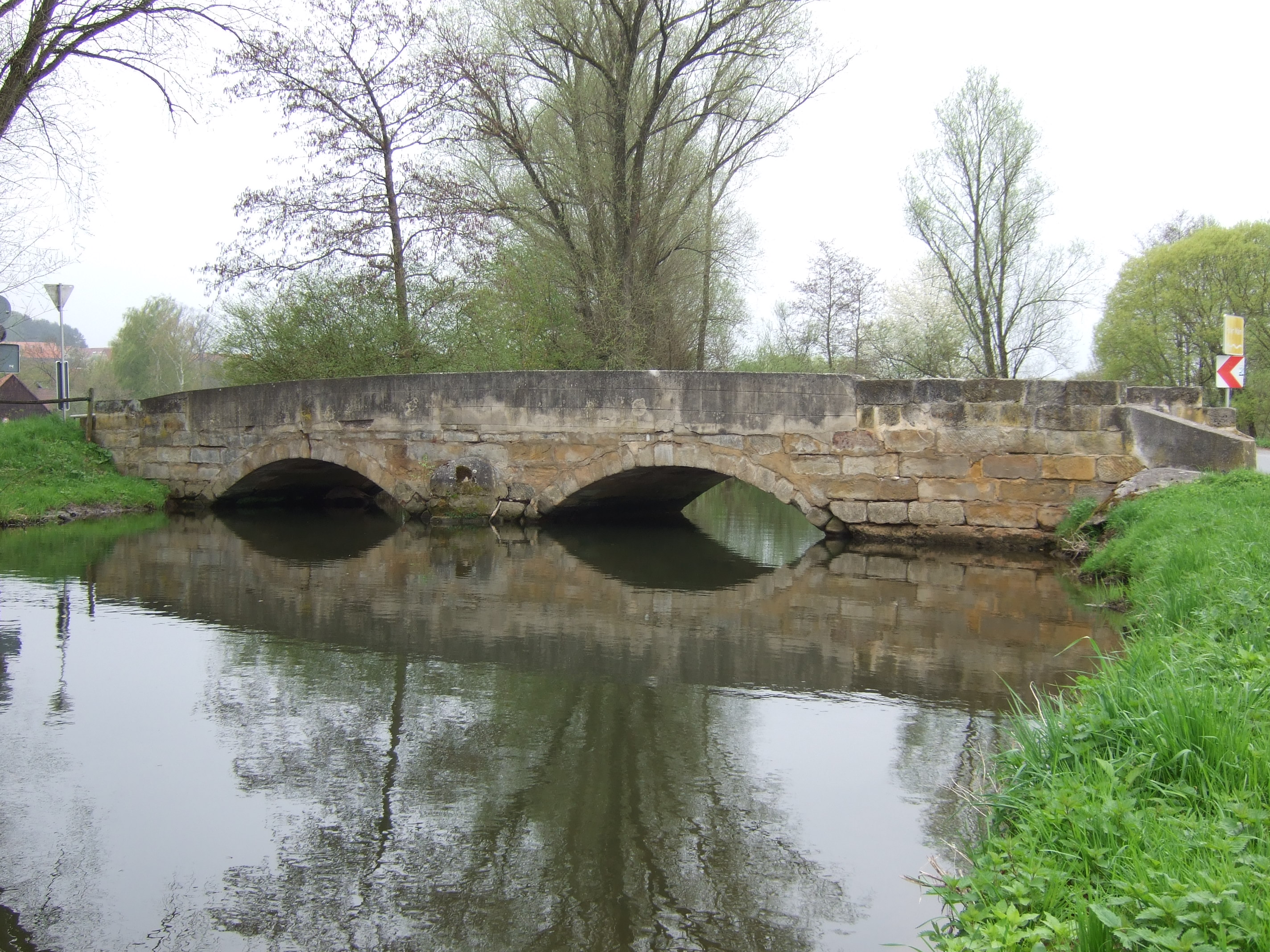 Mainbrücke Heinersreuth